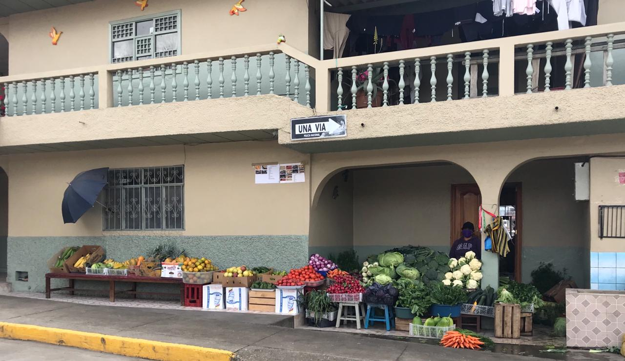 Frutería en la parroquia de San Joaquín, Cuenca- Ecuador